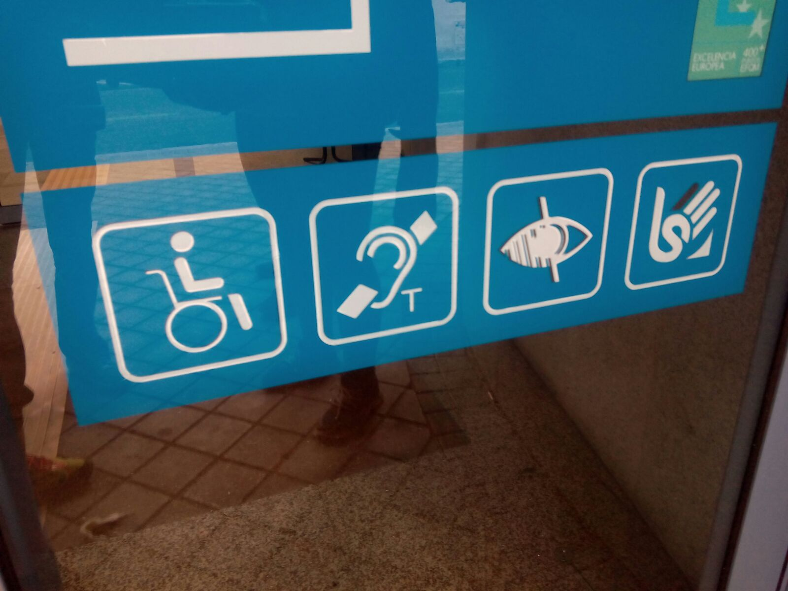 Símbolo bucle magnético. Es un oído con una línea y una T. Es el segundo icono de la imagen